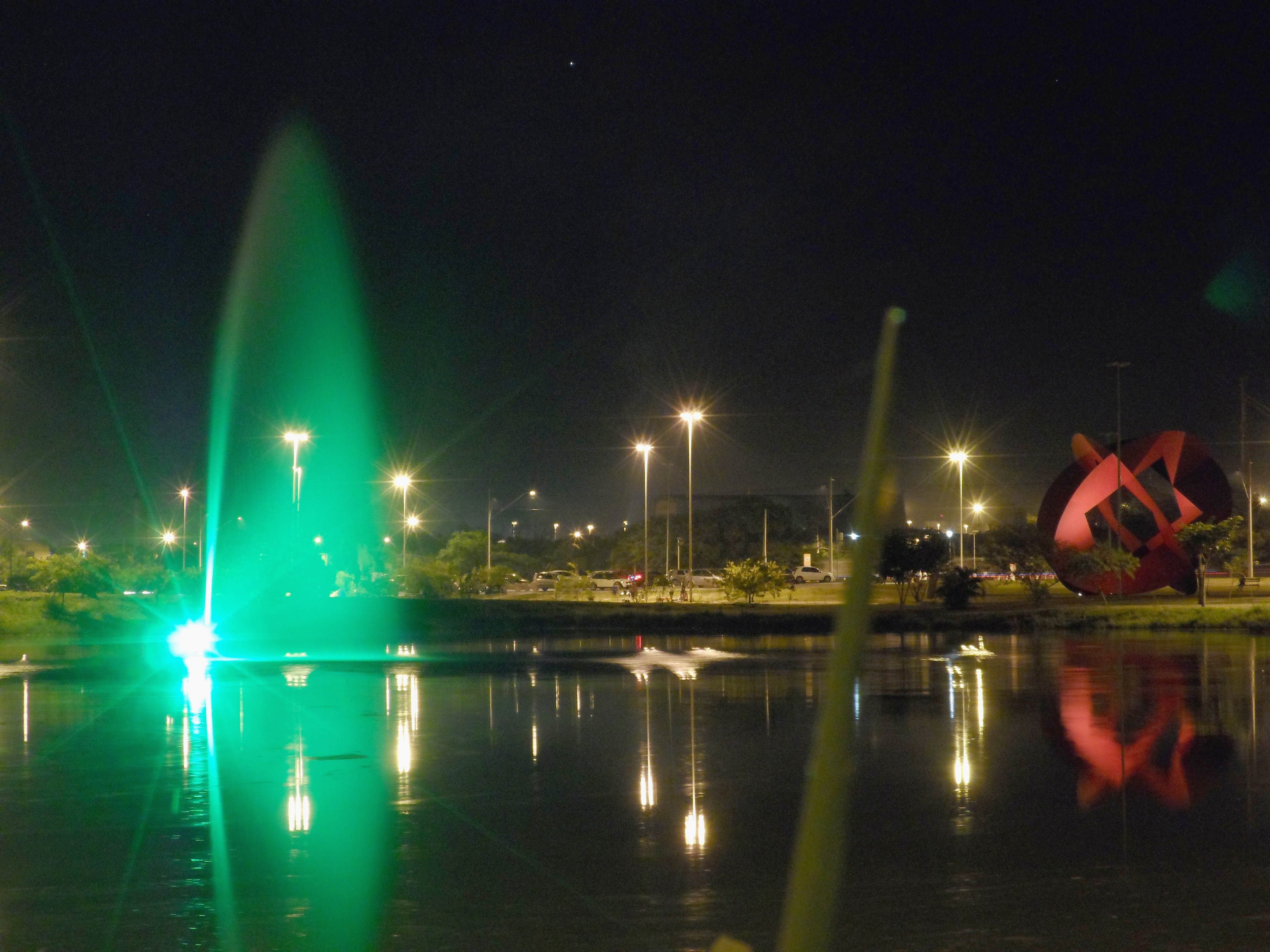 Parque das Águas há noite - cidade de Sorocaba - São Paulo.